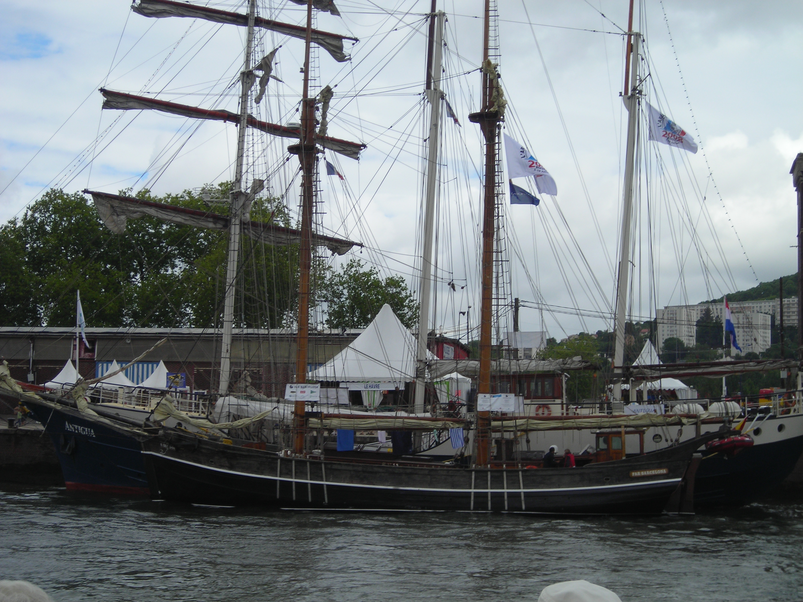 Le Far Barcelona, navire espagnol d'origine norvégienne